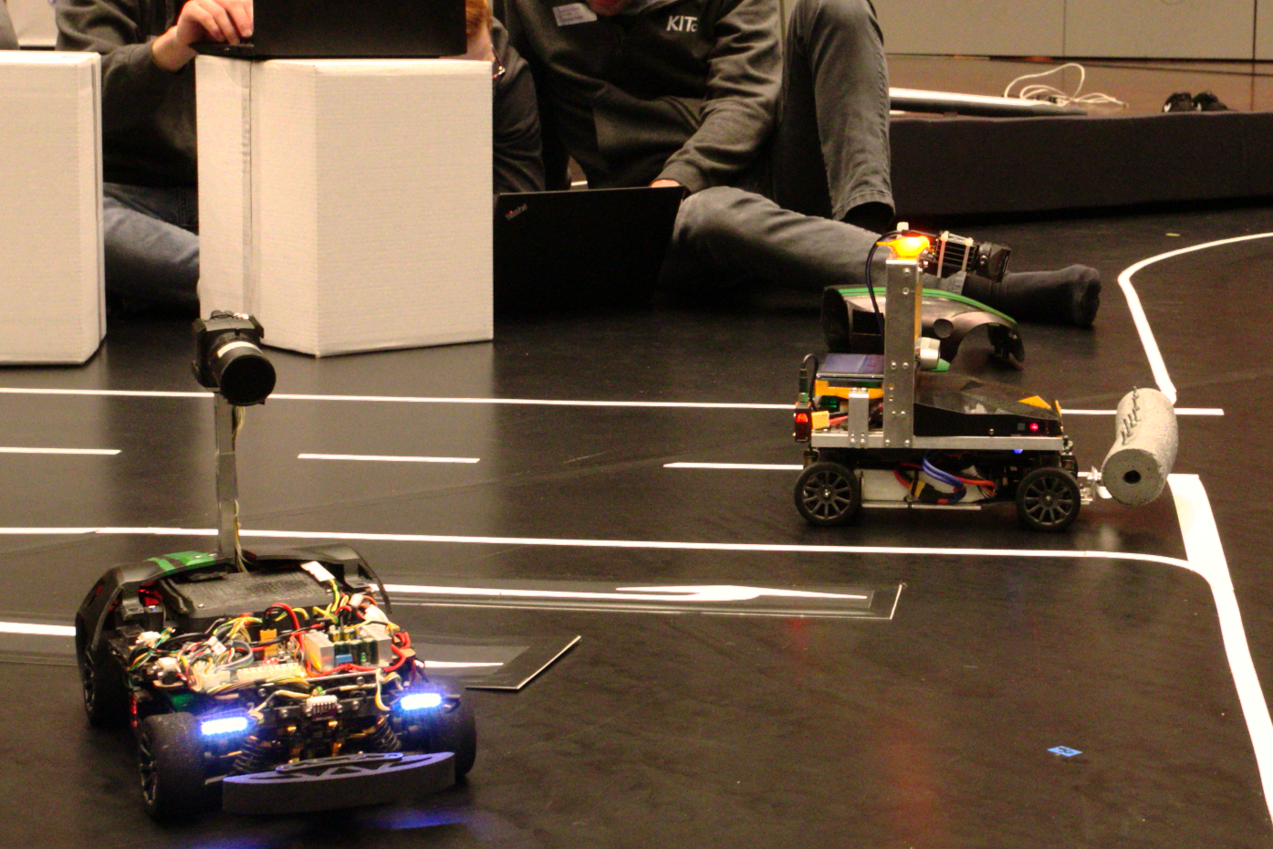 Fahrzeuge der Teams KITcar und Spatzenhirn